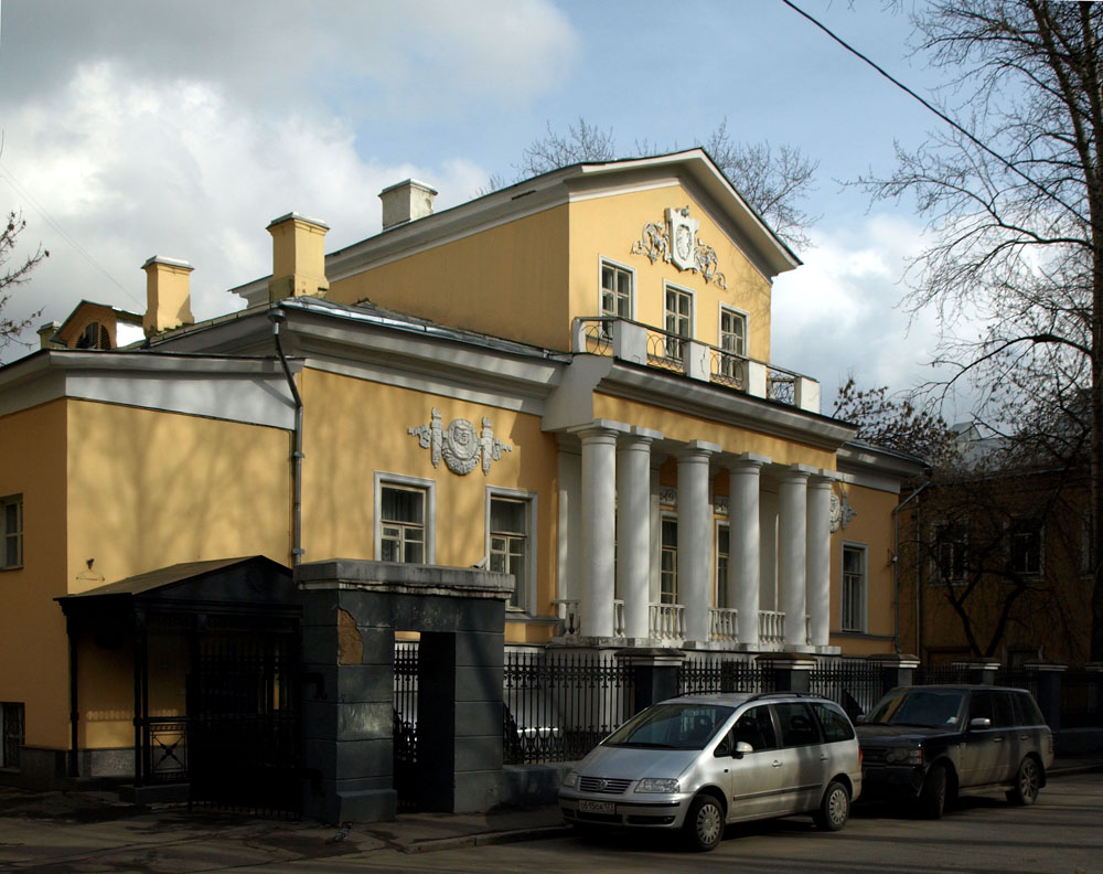 Chisty lane, Moscow. Sophia Volkonskaya house, 1830-s.Москва, Чистый переулок, 4. Дом Софьи Волконской.